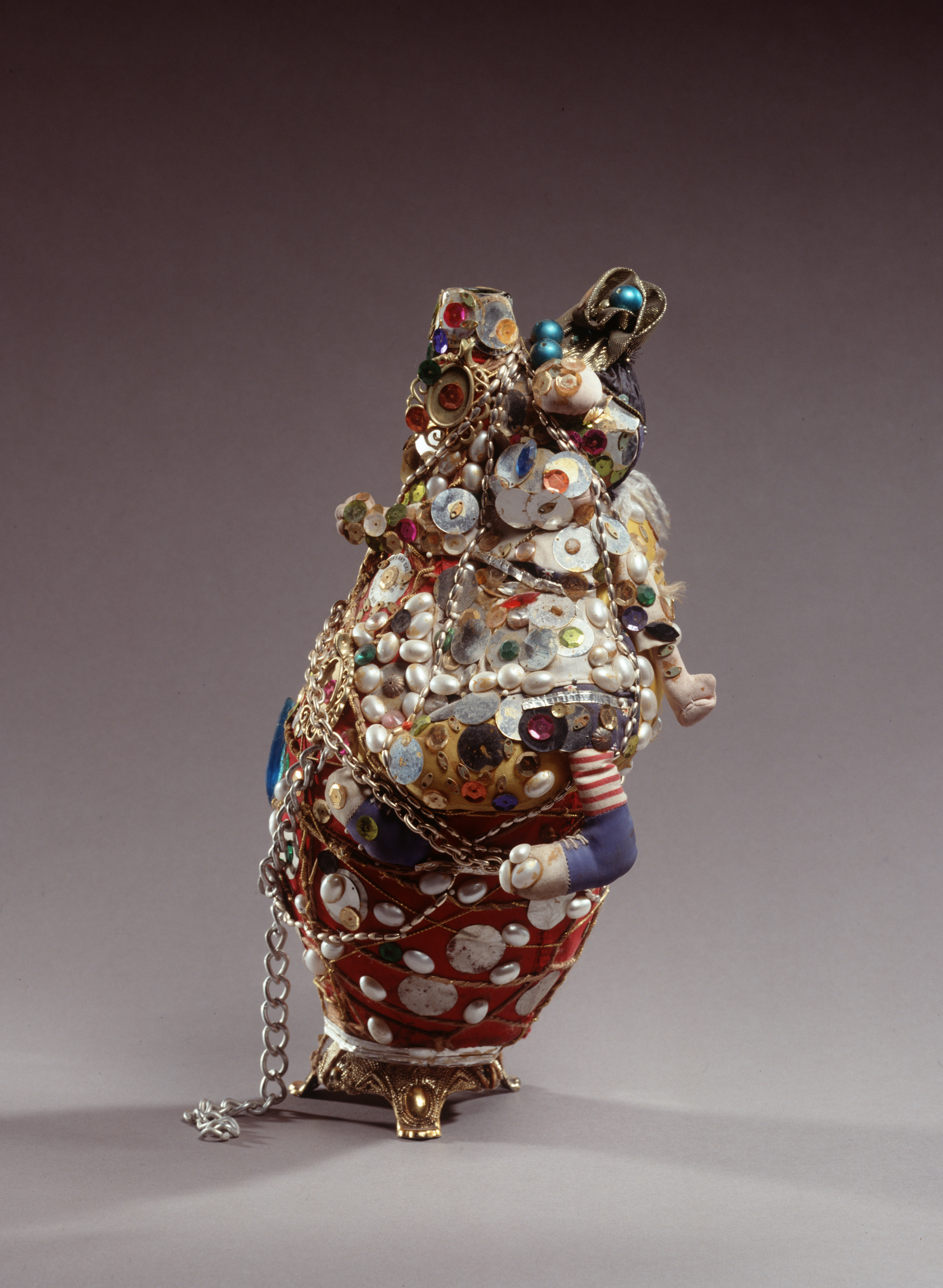 ceremoniële fles. Een 'paquet Kongo' is vergelijkbaar met de zogenoemde Kongo nkisi (uit o.a. Dem. Rep. Congo en Rep. Congo). Een Nkisi functioneerde als houder van krachtstoffen. Een 'paquet Kongo' wordt binnen de Voodoo religie op Haïti gebruikt en heeft het vermogen de Lwa of Loa (goden/geestwezens) te activeren. De gebruikte krachtstoffen verschillen doorgaans van de krachtstoffen gebruikt in Kongo nkisi. Deze ingepakte flessen worden gewoonlijk bewaard op altaren en gebruikt in genezingsceremonieën, maar konden ook voor privégebruik worden aangewend. De slavernijgeschiedenis heeft tal van religies van Afrikaanse oorsprong doen ontstaan in Brazilië (Candomblé, Santeria) de Verenigde Staten (Santeria, Candomblé) en het Caribisch gebied (Voodoo, Santeria). De Afrikaanse slaven mochten hun eigen spirituele tradities niet uitoefenen omdat die als bedreigend werden ervaren. Door hun oorspronkelijke goden en geestwezens als het ware te vermommen als bijvoorbeeld katholieke heiligen slaagde men erin de eigen rituelen en geloofspraktijken min of meer geaccepteerd te krijgen. Haïti heeft de van oorsprong West-Afrikaanse religie Vodun zich in combinatie met christelijke religies en inheemse religies ontwikkeld tot Voodoo. Beschrijving Fles, volledig ingepakt met roodgekleurde textiel. Op het textiel is een stoffen pop bevestigd die zit op een maan. Zowel de pop als het textiel op de fles zijn volledig bedekt met kralen en lovers in diverse kleuren en omwonden met kettingen en touw. De fles staat op een goudkleurig plastiek driepotig voetje.